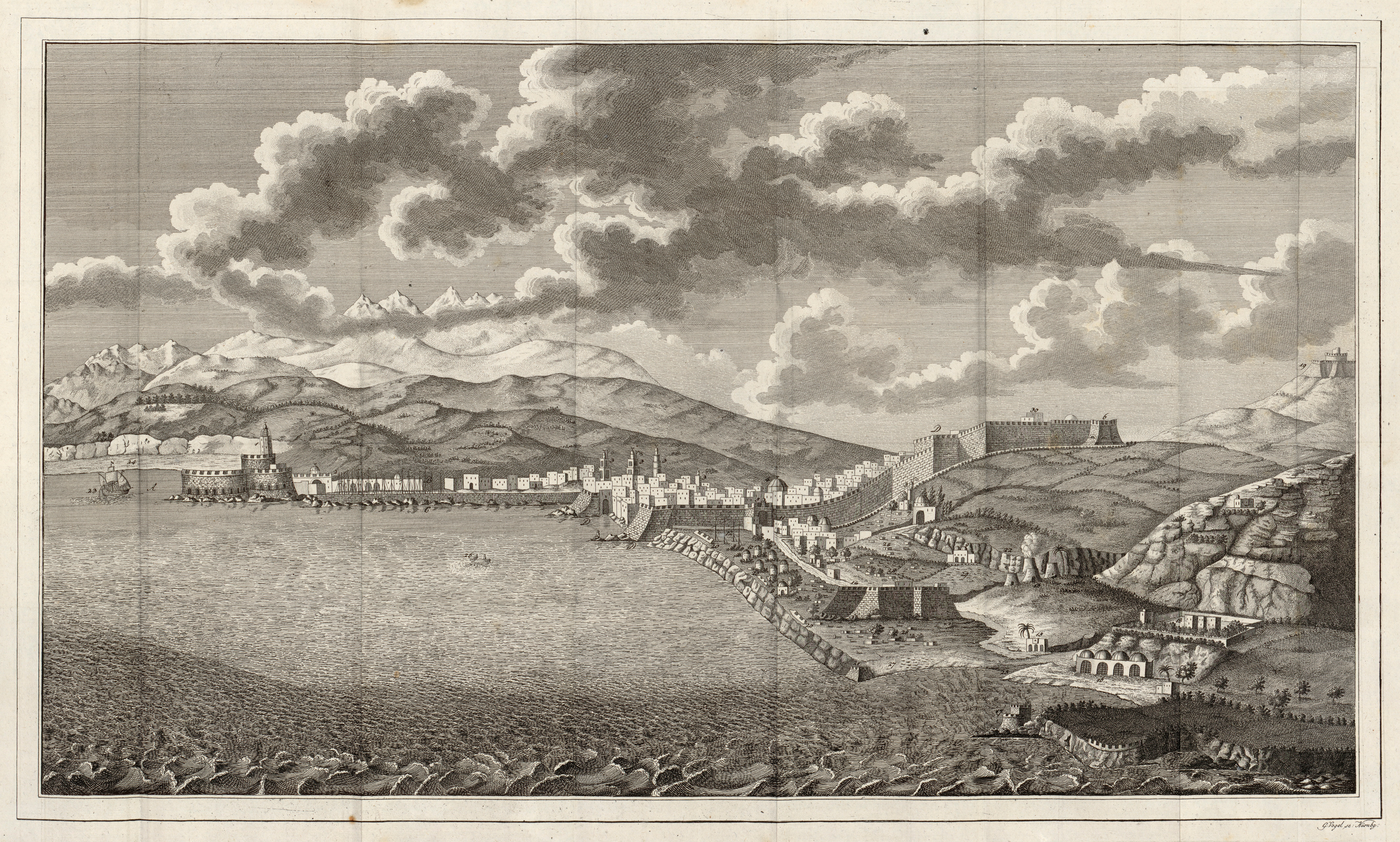 Kart fra Nasjonalbibliotekets kartsamling. Kartet er gitt ut i Altona (1798-1800) og viser Algerie.